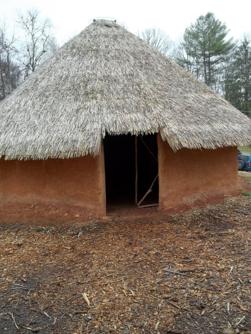 ჩეროკეთა ზამთრის სახლი